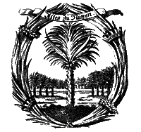 Emblem der fruchtbringenden Gesellschaft Public Domain